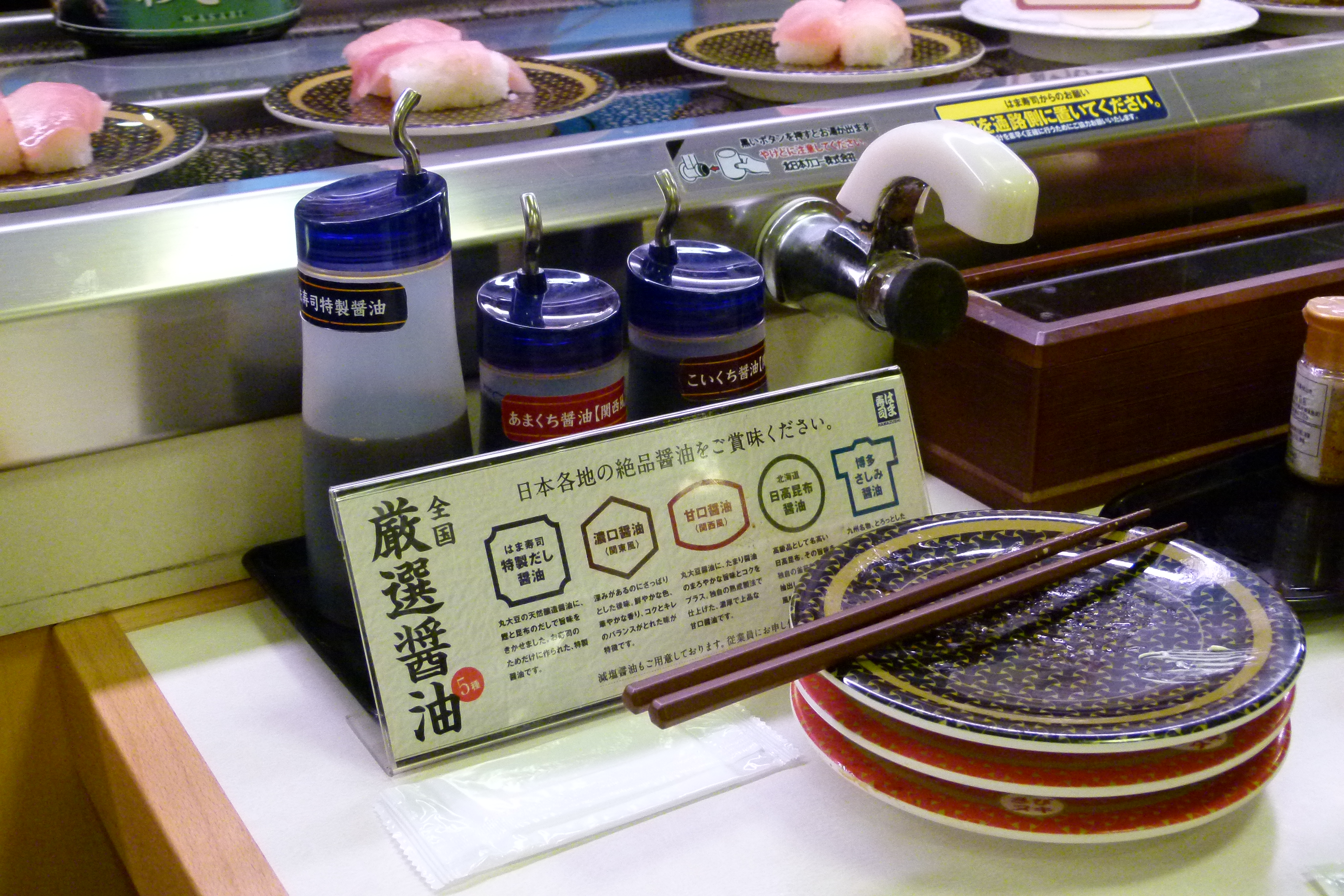 飲品和食物 東広島市 西条 はま寿司